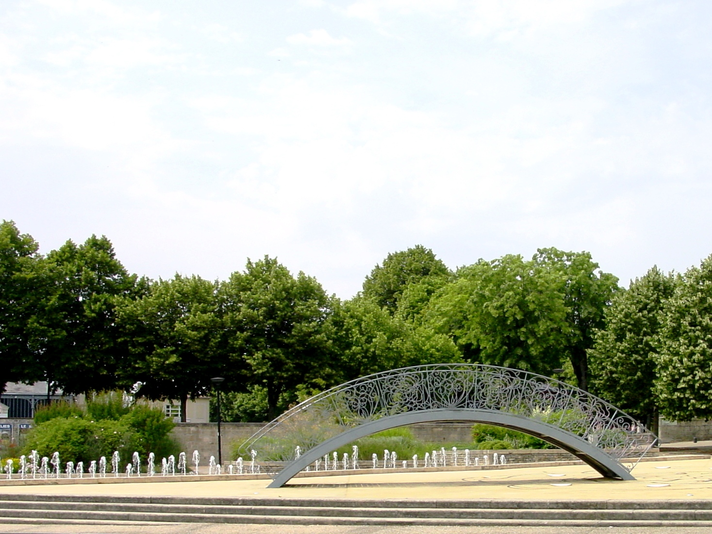 Le pont des Roses, place de la Poste, ville de Melle, département des Deux-Sèvres, France